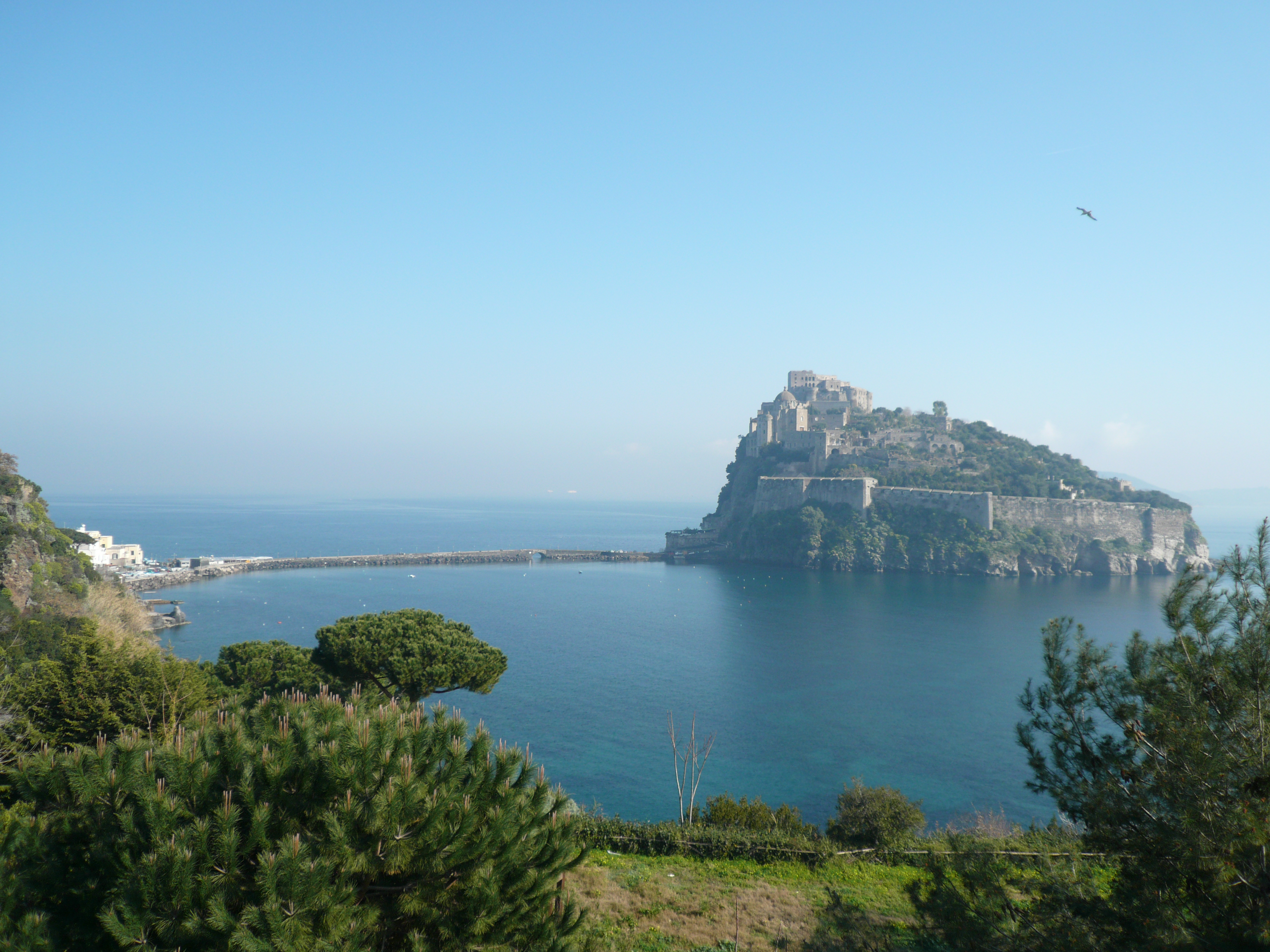 lato sud del Castello Aragonese di Ischia.